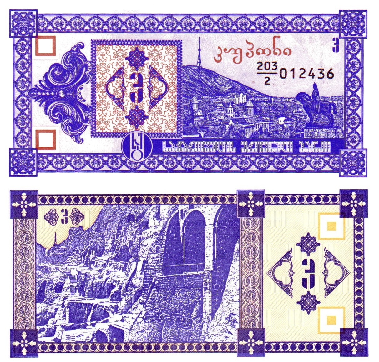 3 купона лари. 2 выпуск. 1993 г.